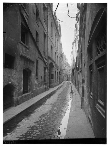 Façade sur rue